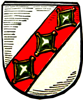 Herb wsi Żerniki, powiat Żnin.